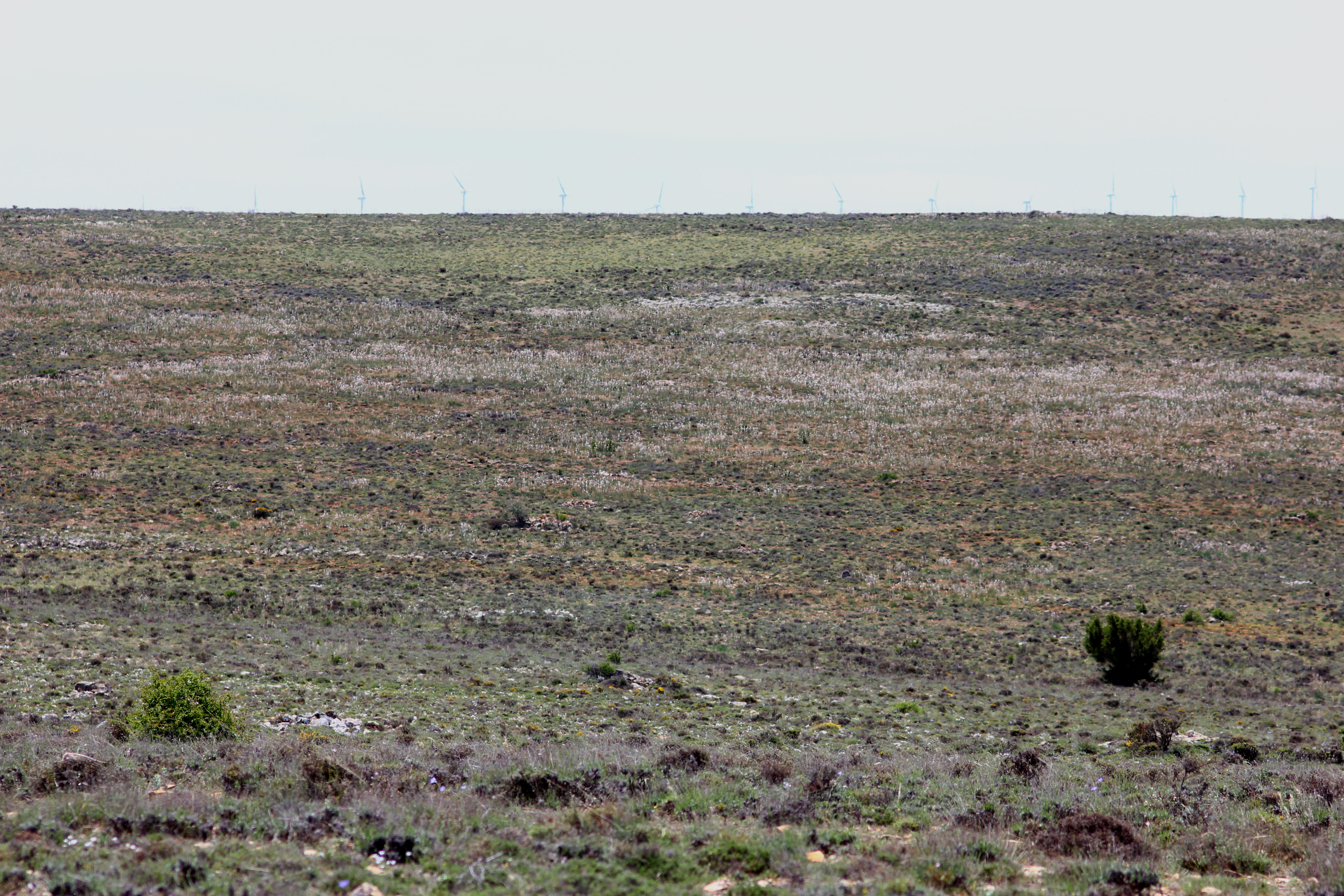 Altos de Barahona This is a photography of a Site of Community Importance in Spain with the ID: ES4170148. Natura2000 entry, EEA entry